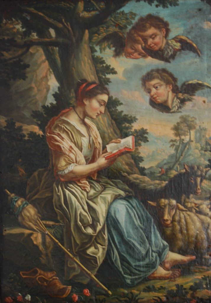 Sainte-Geneviève